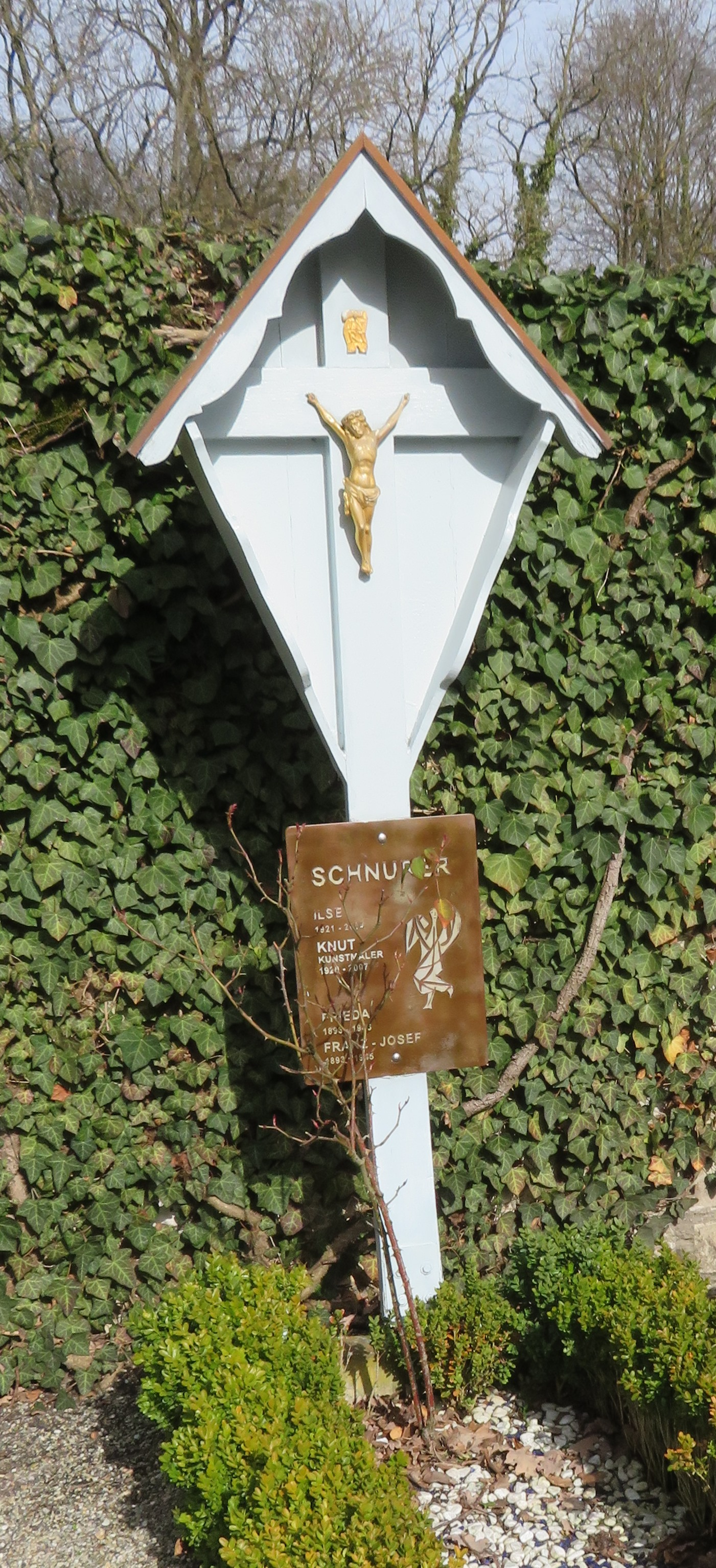 Westfriedhof Ingolstadt